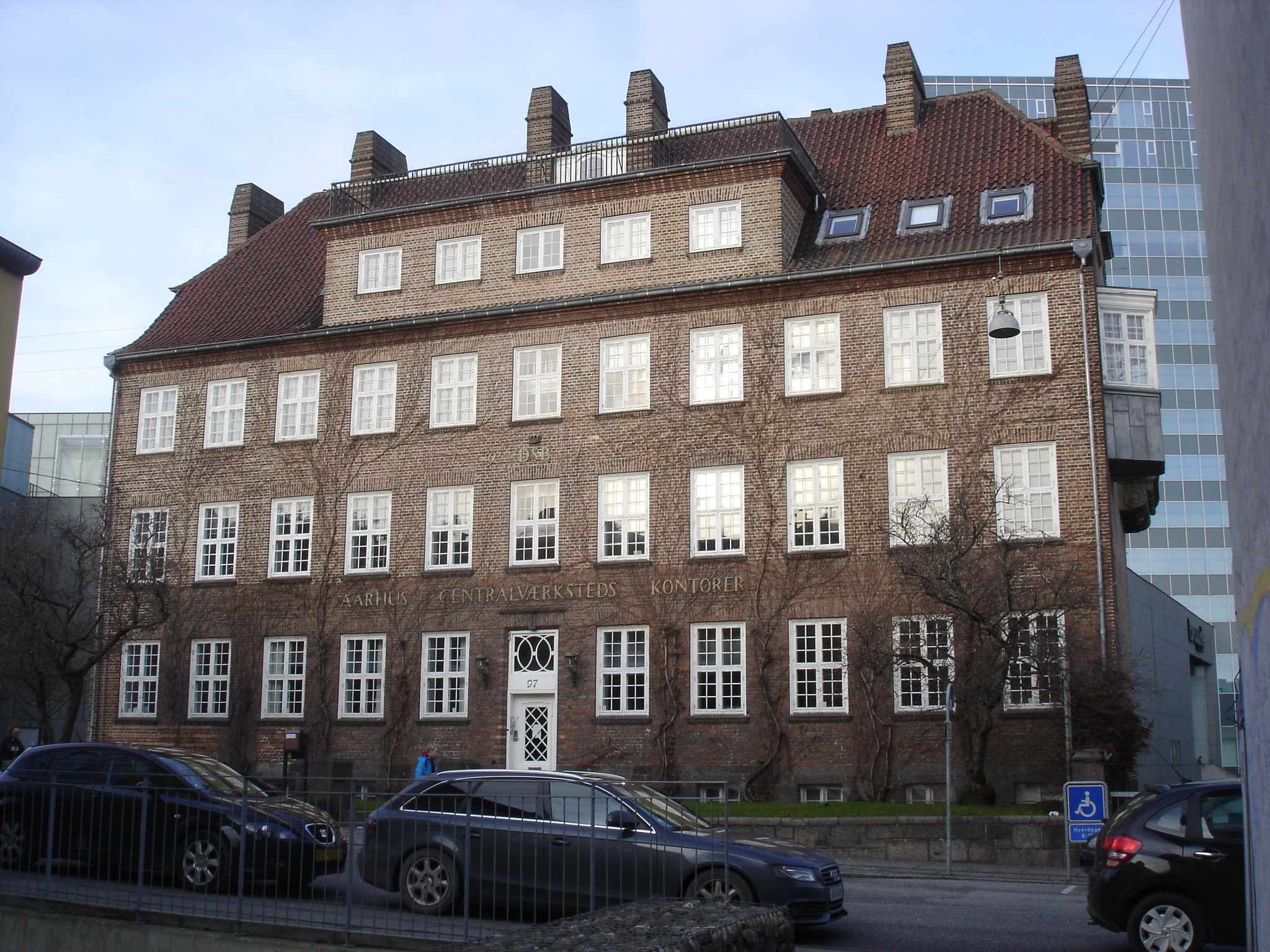 "Baumannhuset", Aarhus Centralværksteds tidligere kontorer i Jægergårdsgade, ombygget og restaureret i 2006. De to nederste etager rummer DGI-husets spinning- og fitnessområde